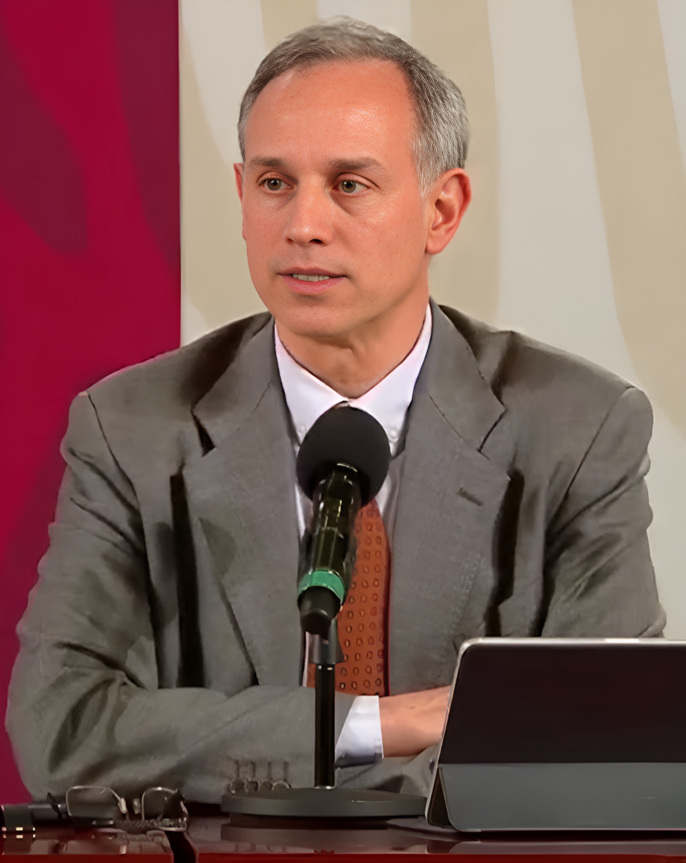 Hugo López.Gatell en una conferencia del COVID-19 (circa 0:16)